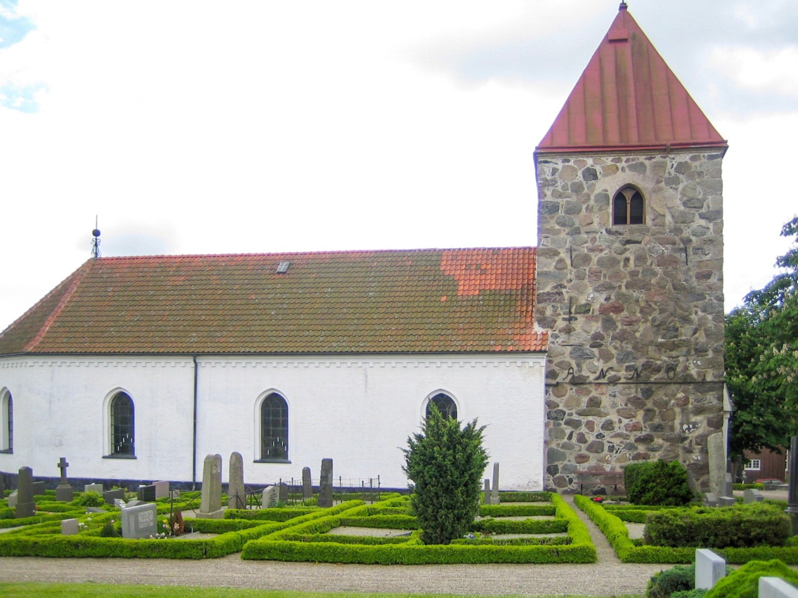 Bild av Västra Vemmenhögs kyrka. Bilden tagen av mig själv den 12 juni 2005.